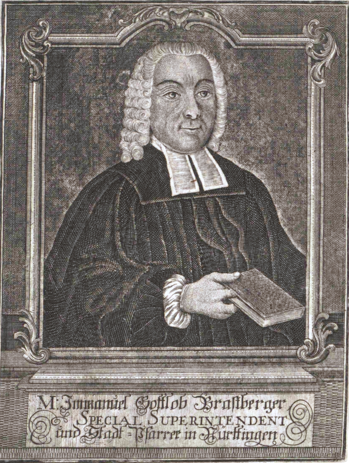 Portrait von Immanuel Gottlob Brastberger, 1716–1764.